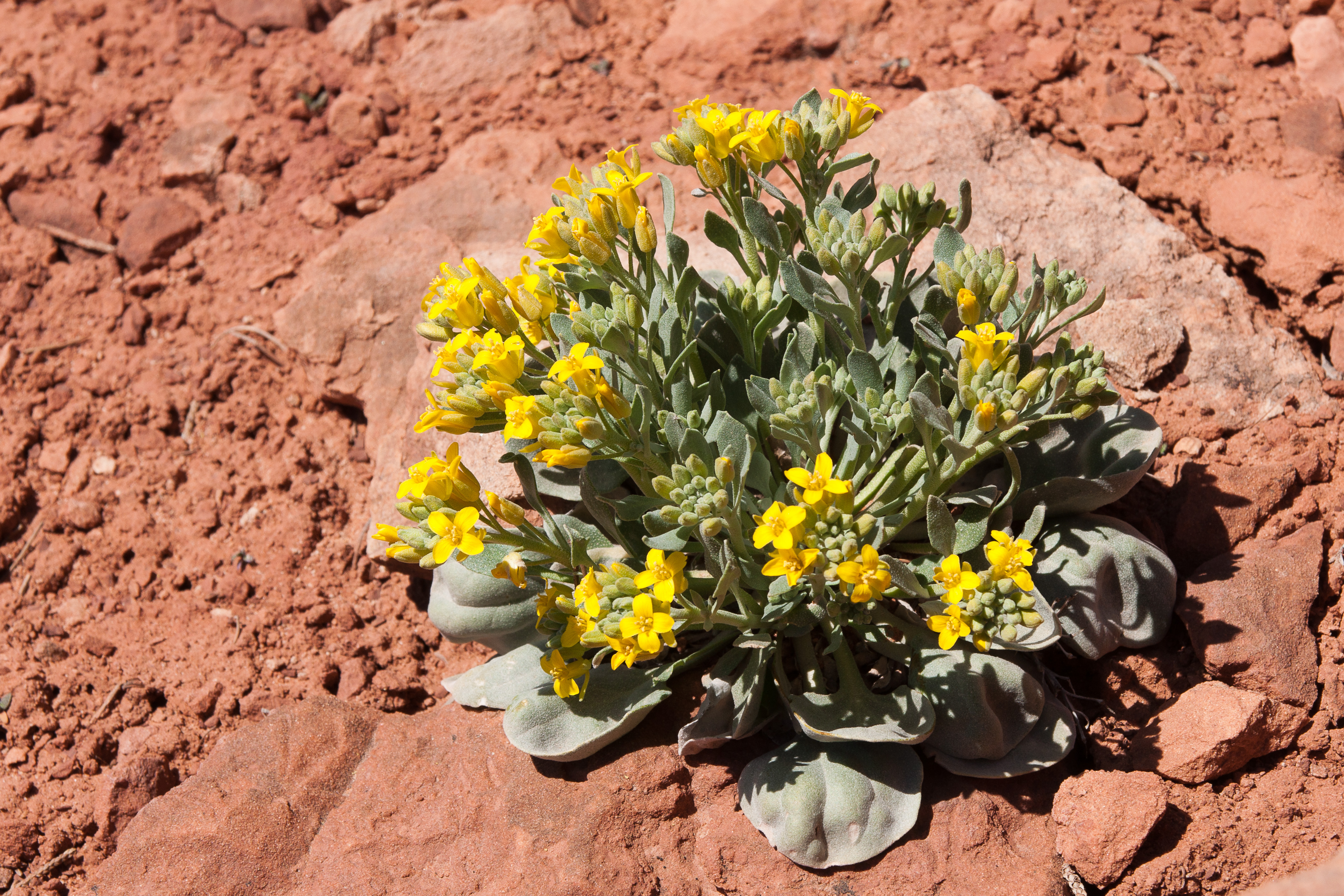 Physaria acutifolia dans Arches National Park